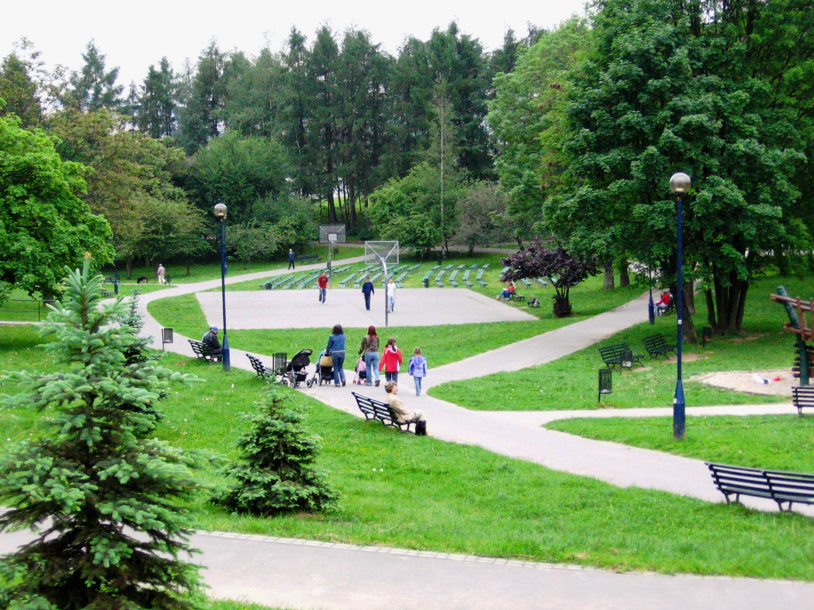 Osiedle Tysiąclecia w Krakowie - park